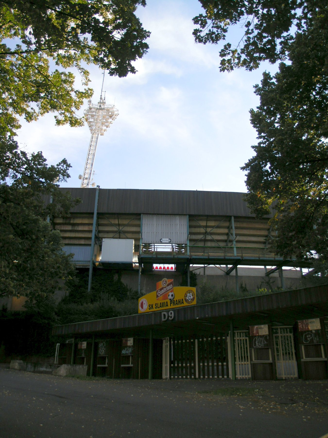 Stadion Evžena Rošického, Praha